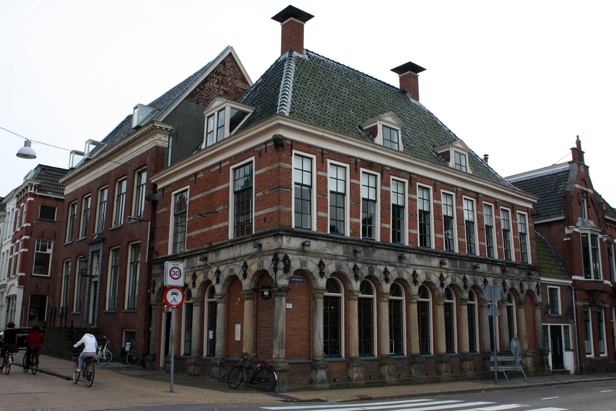 Oude Boteringestraat 74, Groningen